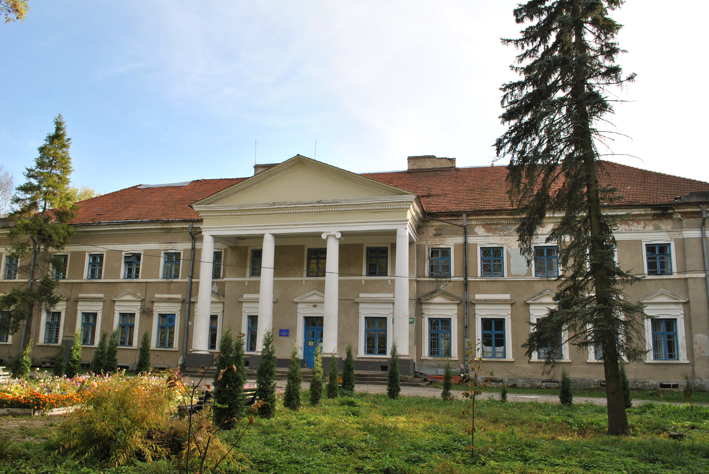 Палац Коритовичів у селі Плотича Тернопільського району Тернопільської області.